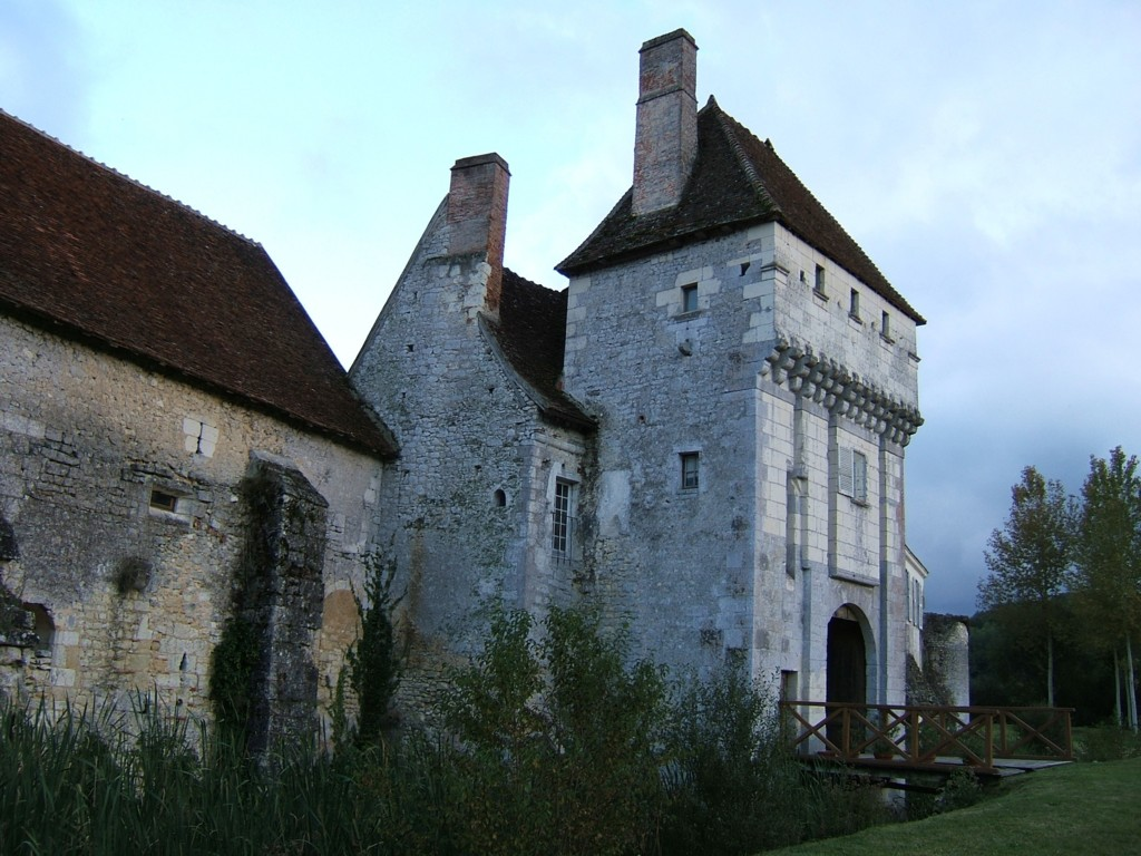 Vue de la porte forte de la Corroirie